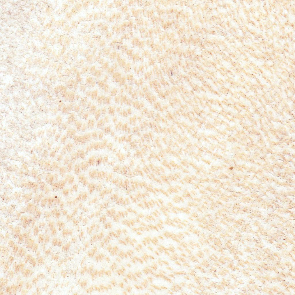 Rauhe Oberfläche eines mittelalterlichen Pergaments.